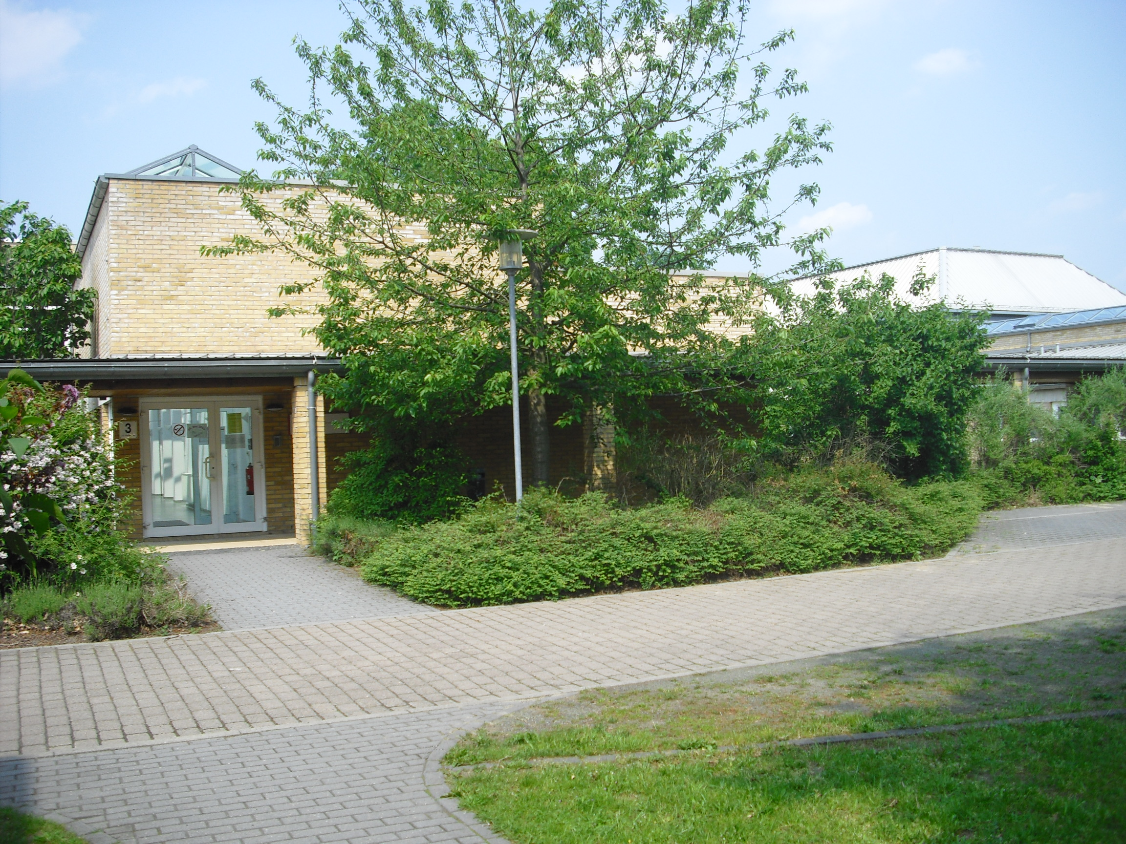 Theologisches Seminar Elstal (FH)